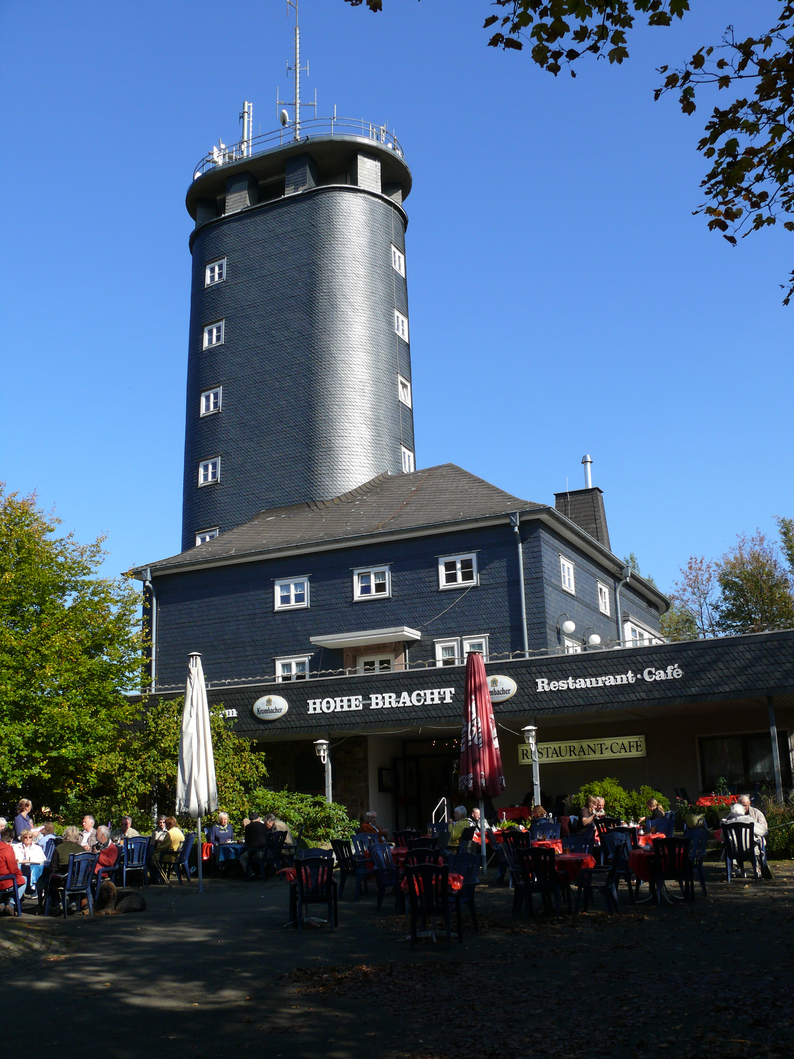 Hohe Bracht Aussichtsturm im Sauerland